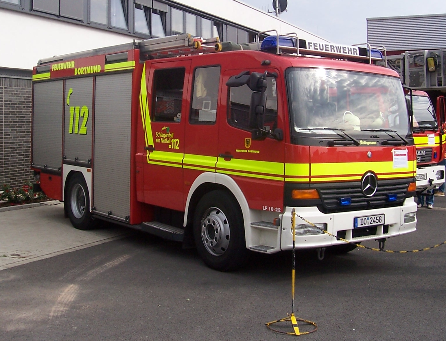 Löschfahrzeug (LF16/22) der Berufsfeuerwehr Dortmund - Fire engine of the fire department Dortmund, Germany